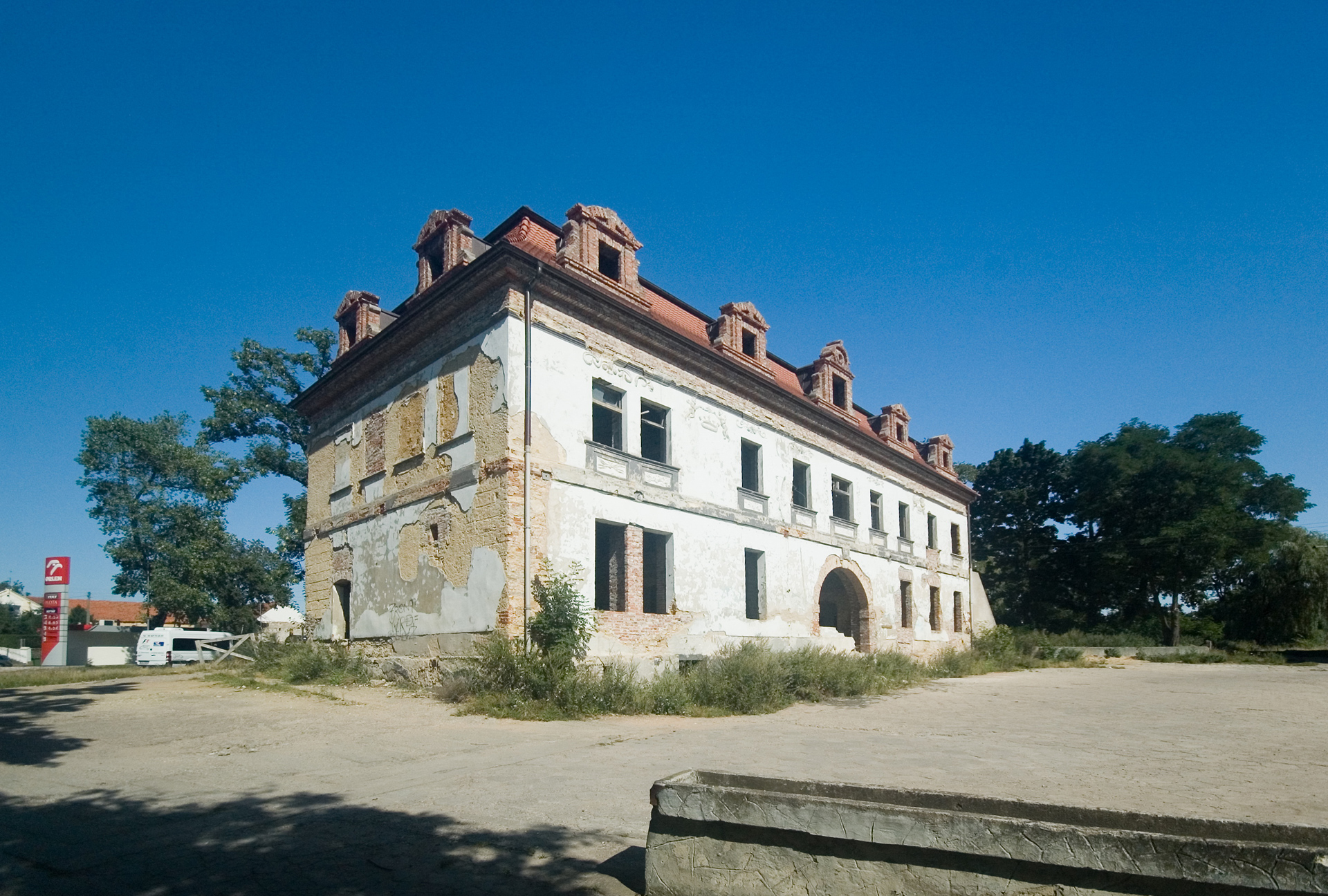 Gniechowice, ul. Wrocławska 7 - pałac, widok od głównej ulicy (zabytek nr A/3814/1249 z dn. 1965-03-05)